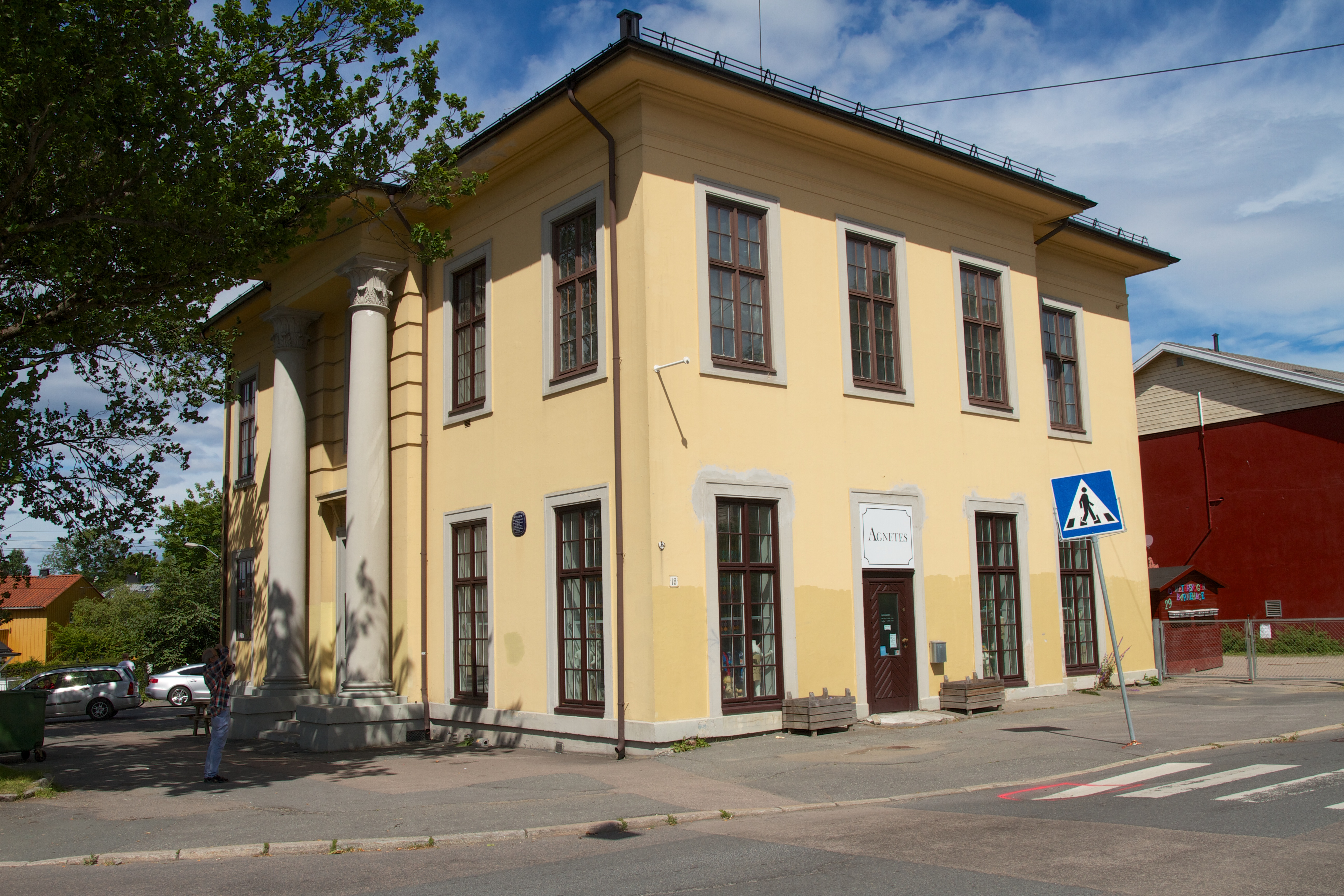 Grefsen og Disen Velhus.